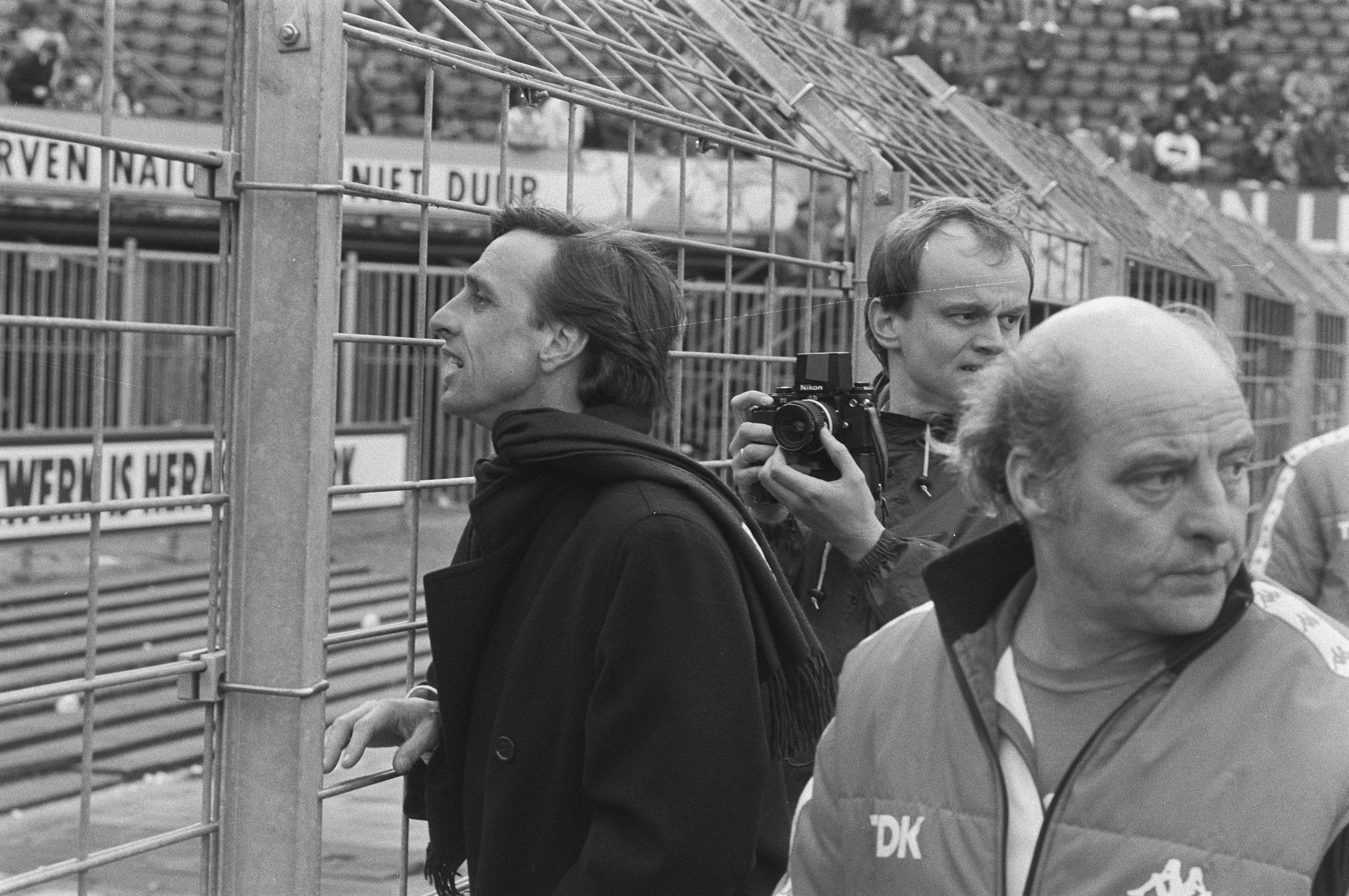 Collectie / Archief : Fotocollectie Anefo Reportage / Serie : Ongeregeldheden bij Ajax-Feyenoord Beschrijving : Johan Cruijff maant Ajax-aanhang tot kalmte nadat er ongeregeldheden waren uitgebroken. Op de voorgrond materiaalman Sjaak Wolfs Datum : 31 maart 1986 Locatie : Amsterdam, Noord-Holland Trefwoorden : trainers, voetbal Persoonsnaam : Cruijff, Johan, Wolfs, Sjaak Fotograaf : Molendijk, Bart / Anefo Auteursrechthebbende : Nationaal Archief Materiaalsoort : Negatief (zwart/wit) Nummer archiefinventaris : bekijk toegang 2.24.01.05 Bestanddeelnummer : 933-6127